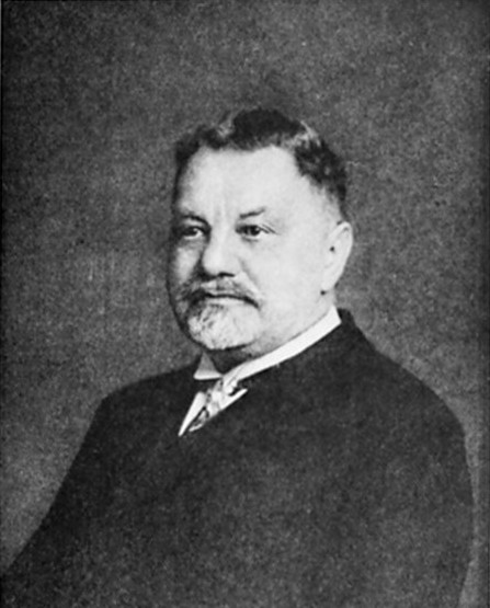 Jan Bašta (1860-1936), český železniční inženýr